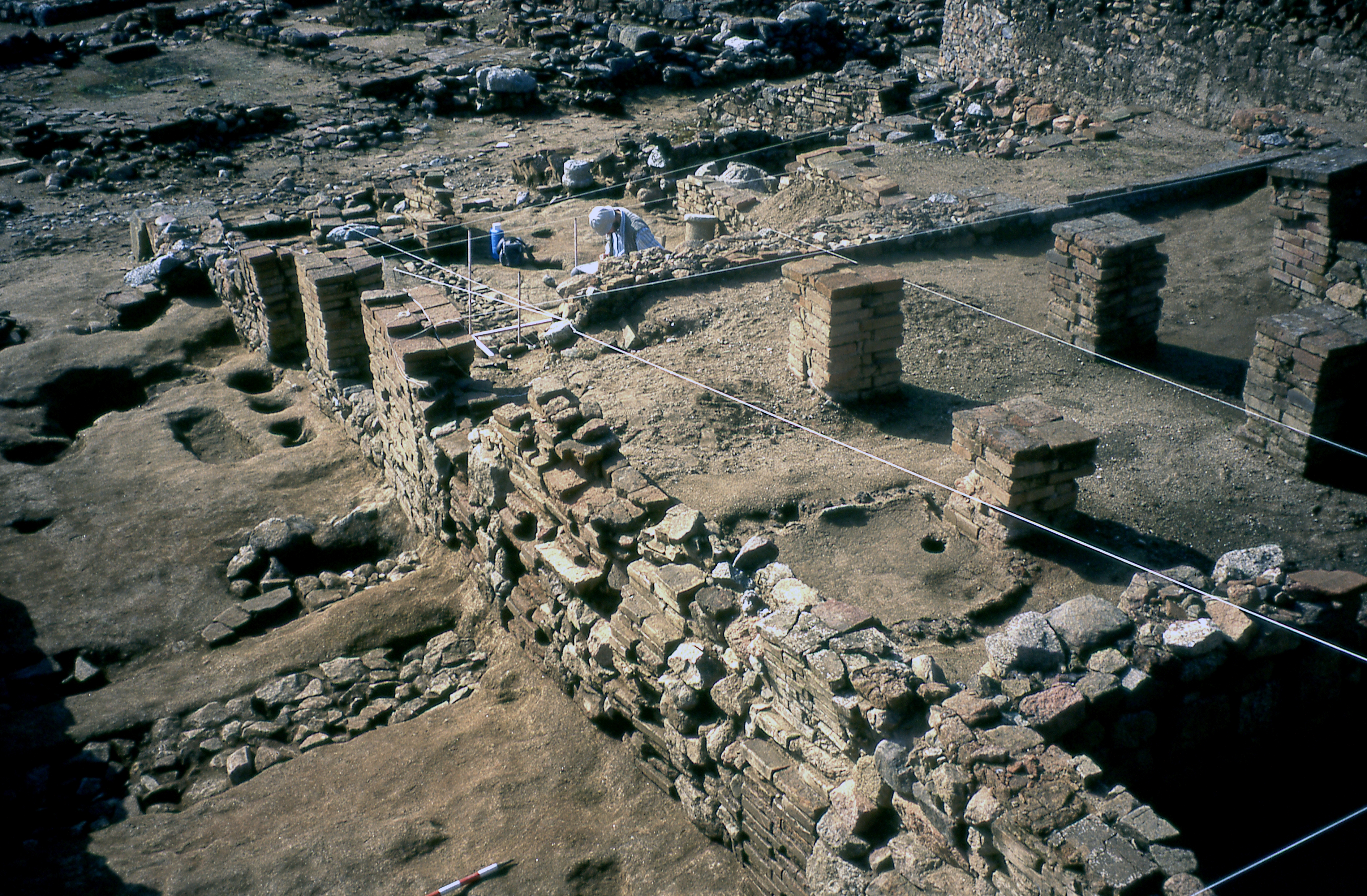 Blick auf Haus 2 während der Grabungen